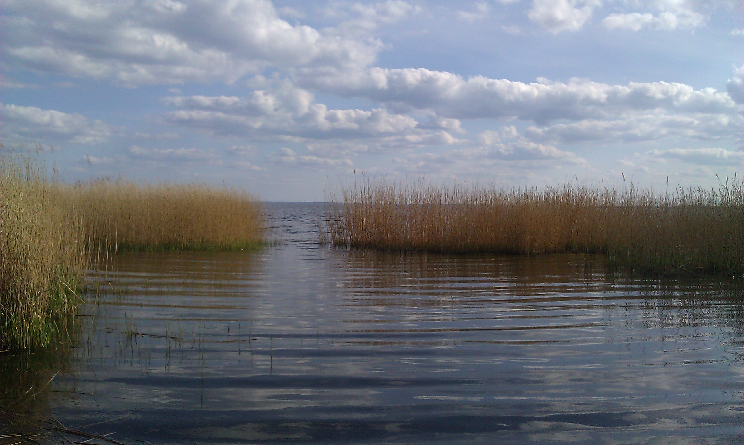 Obszar specjalnej ochrony ptaków Delta Świny. This is a photography of Natura 2000 protected area with ID PLB320002